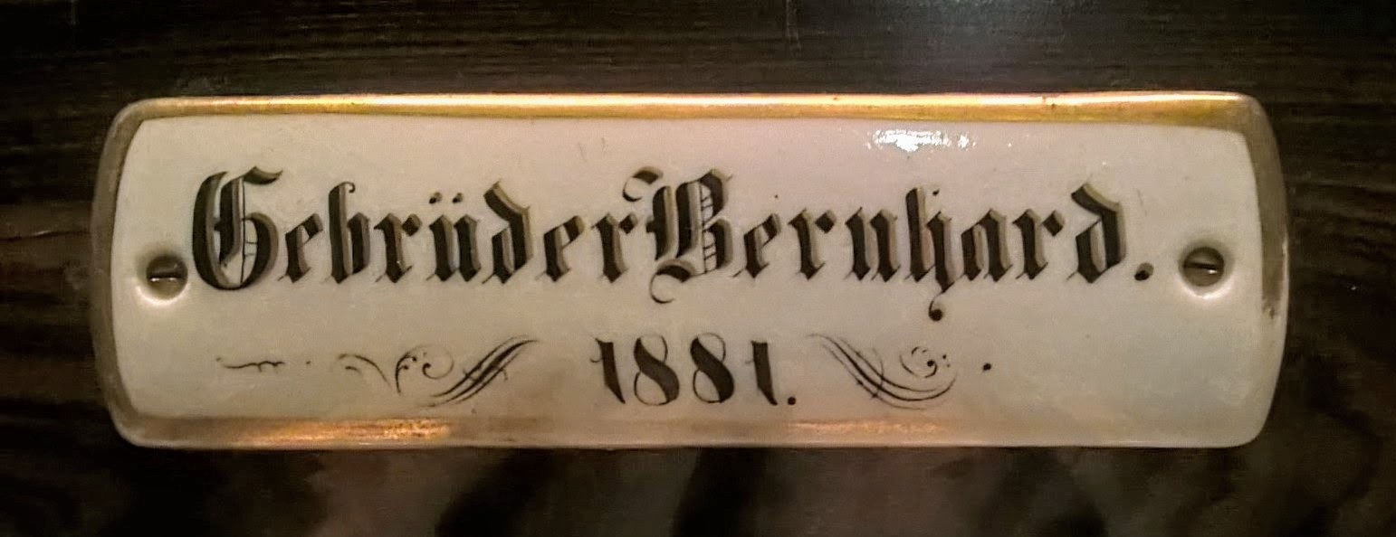 Orgel der Kirche in Grüningen, Pohlheim, Hessen, Deutschland